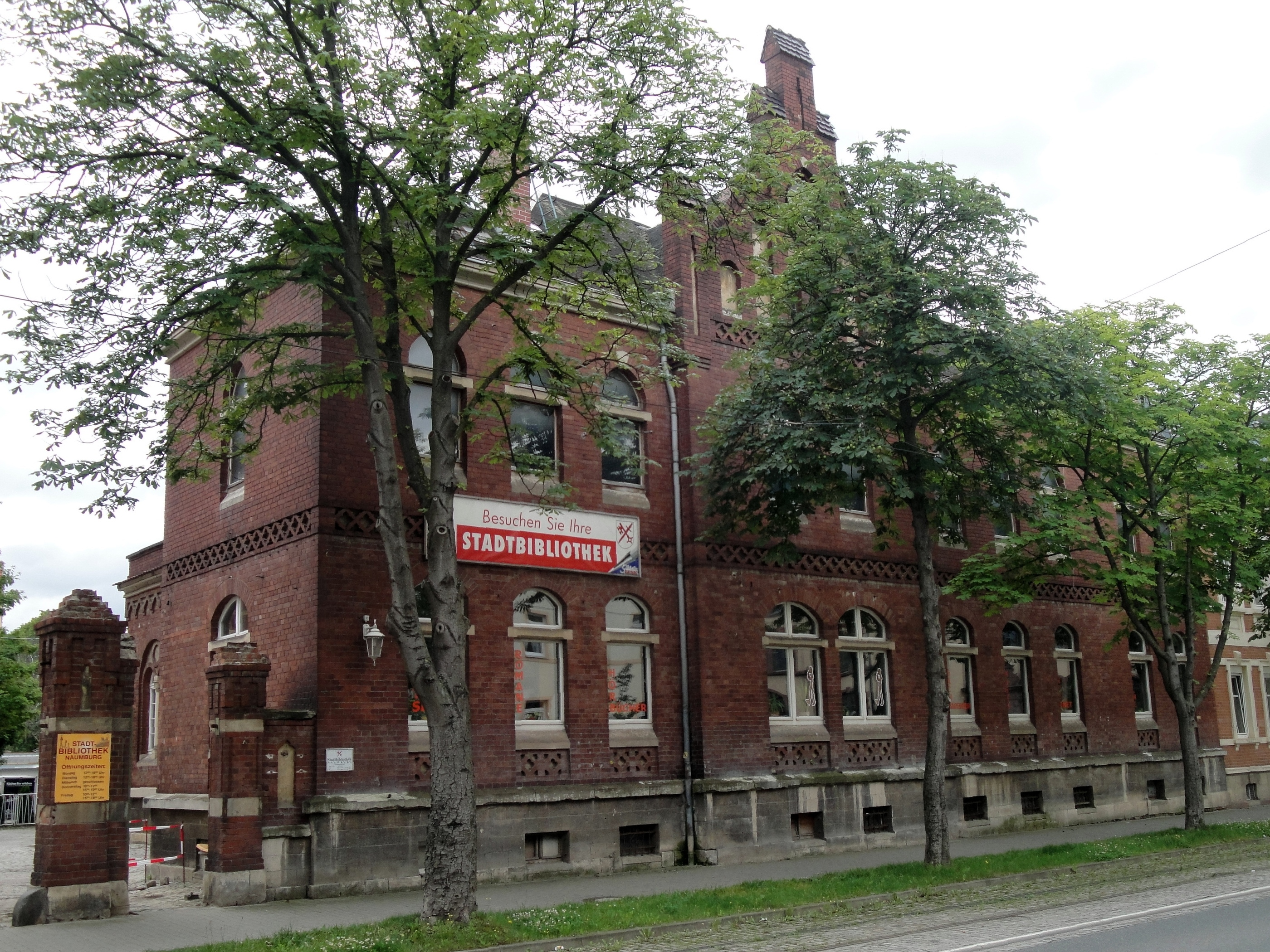 Stadtbibliothek Naumburg (Saale)